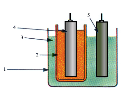 Leclanché cell